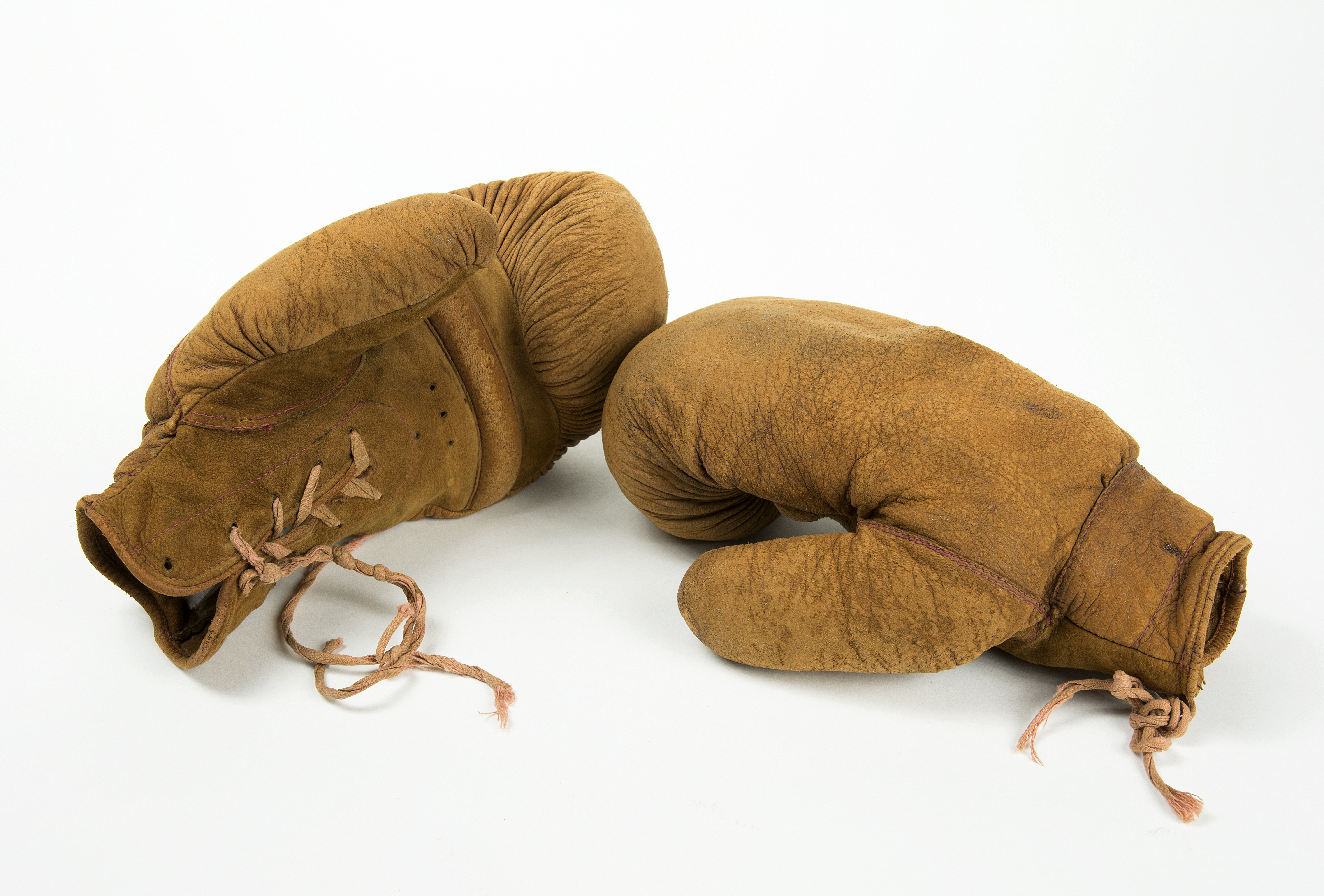 Ett par boxhandskar, 1930-talet. Dessa handskar har en gång tillhört flygingenjör Edmund Sparmann f 16 juni 1888. Flygvapenmuseum FVM.120007.